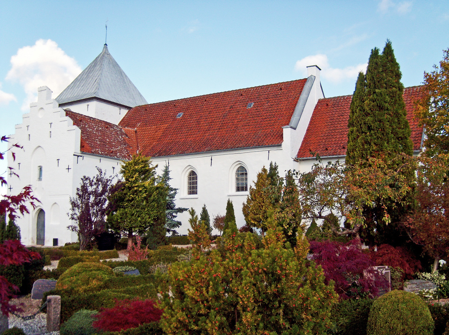 fra sydøst